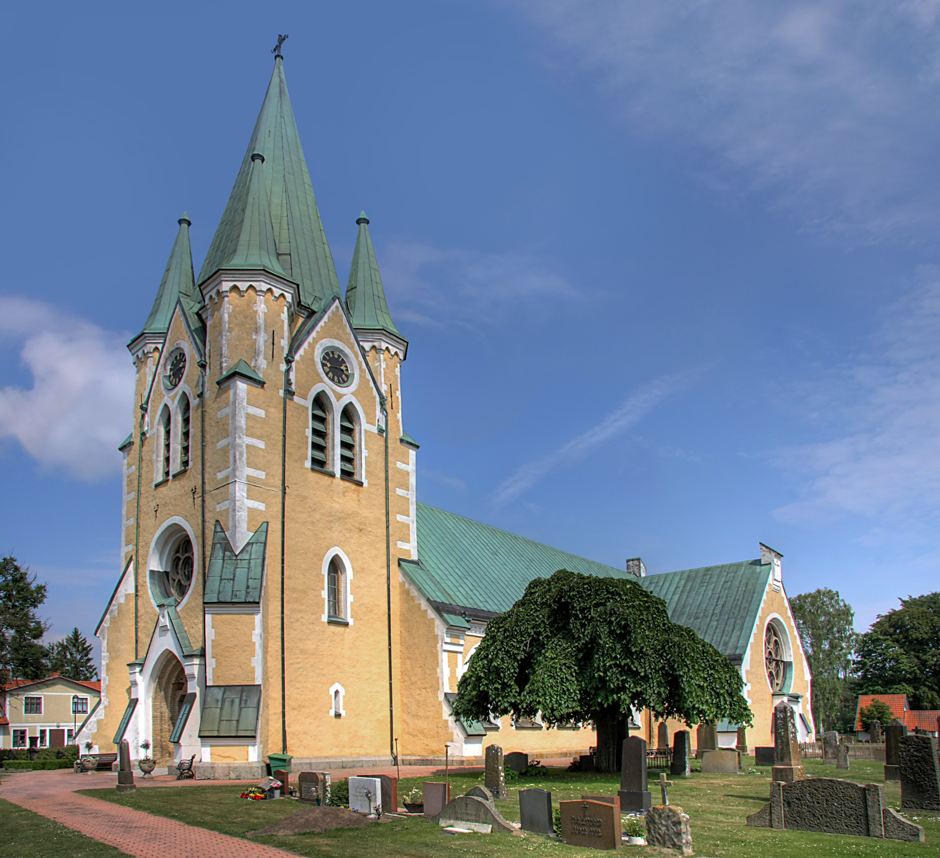 Västra Vrams kyrka utanför Tollarp i Skåne. Bilden är sammanfogad och HDR-hanterad av totalt nio olika exponeringar, tre vardera i tre vinklar.